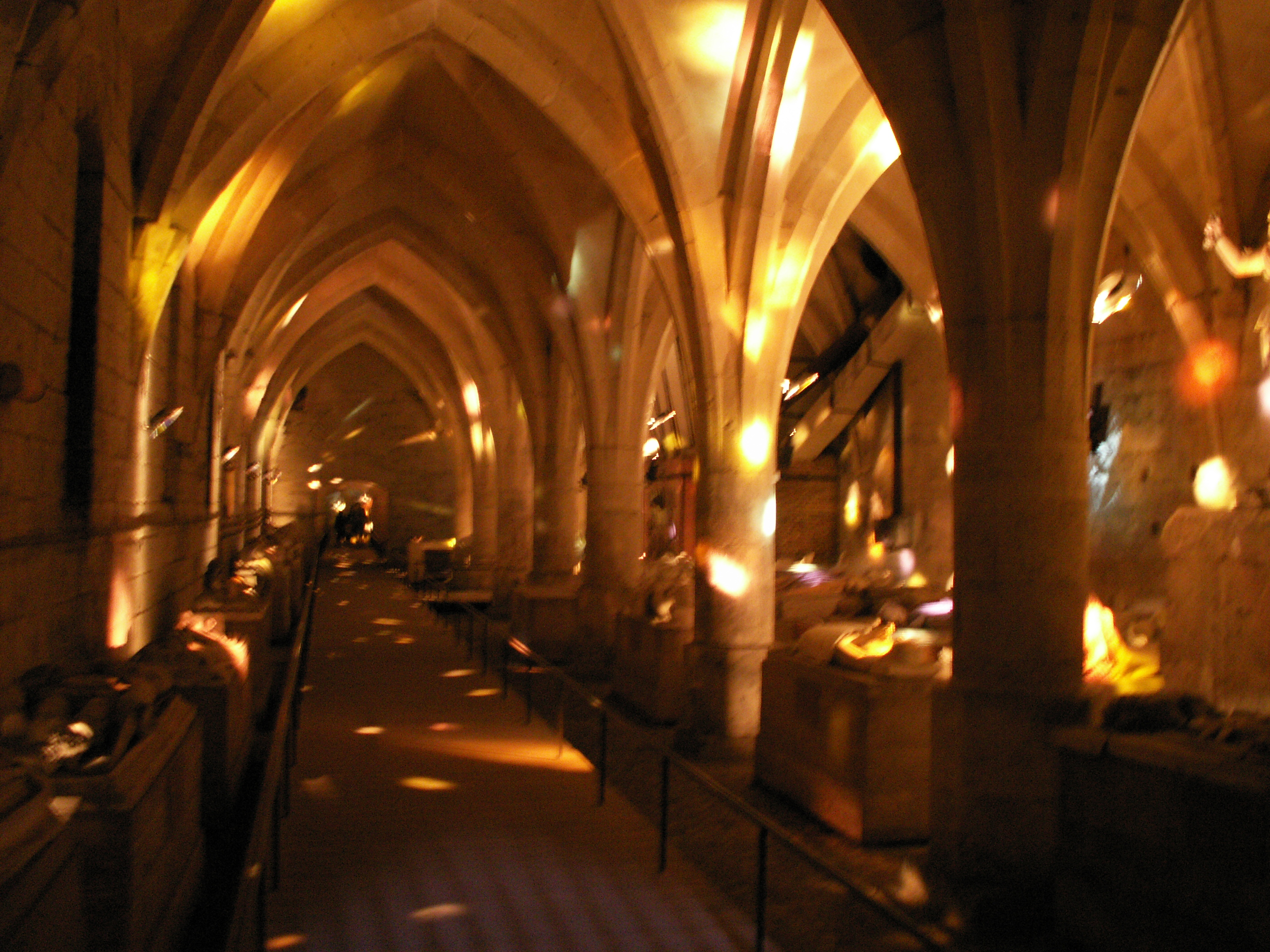 Bal des gisants du château de Pierrefonds